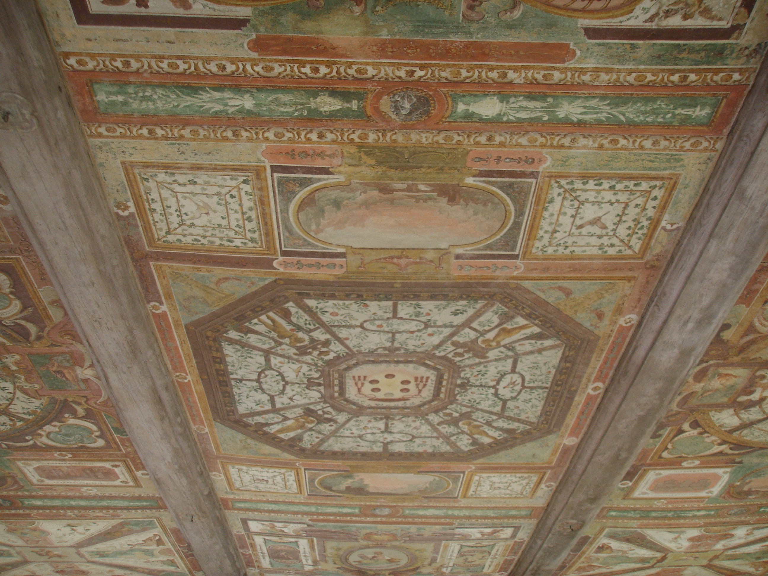 Villa Medicea di Careggi, inside in Florence, Italy